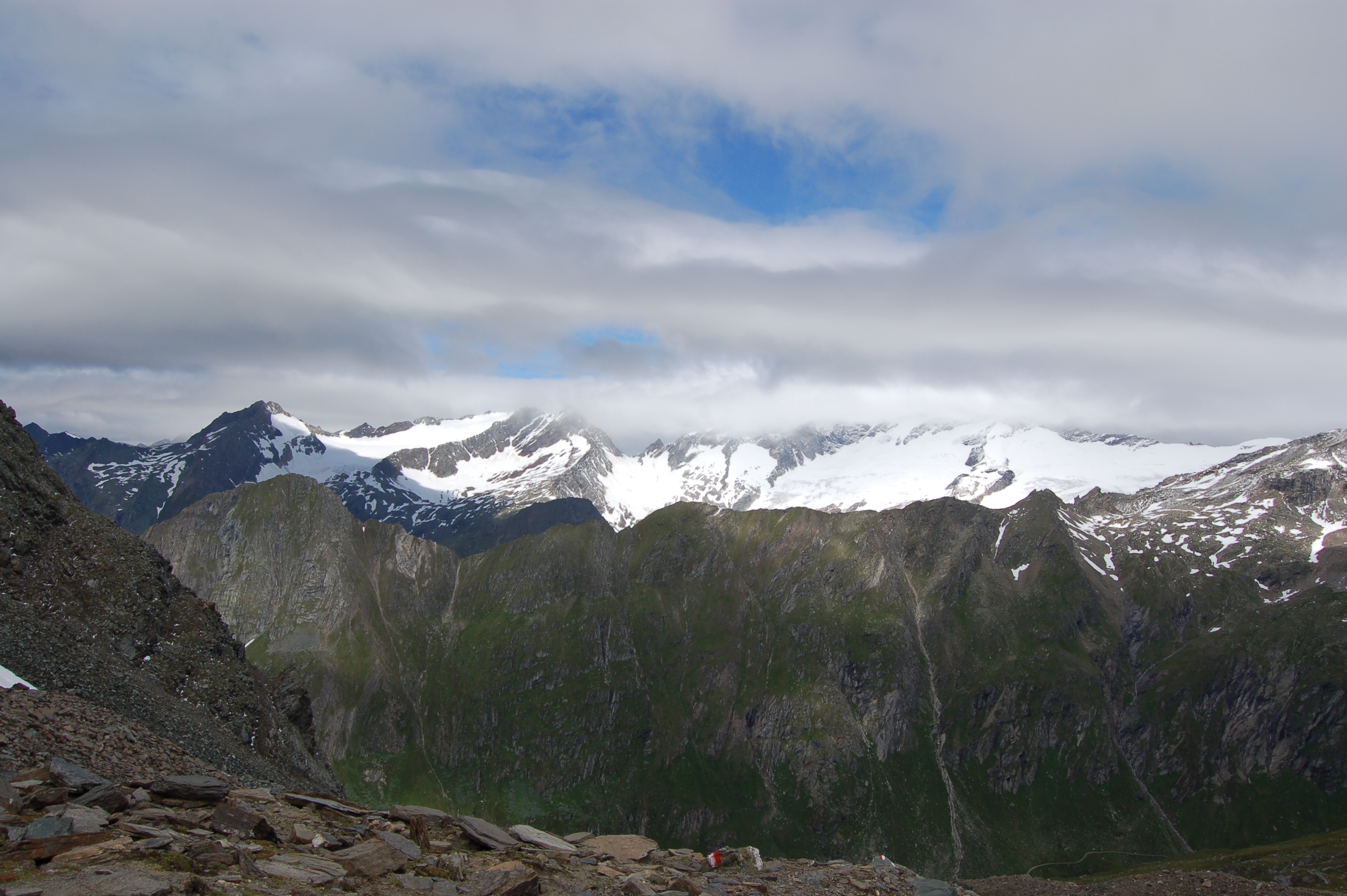 Der Quirl in der Venedigergruppe im Nationalpark Hohe Tauern, Osttirol. This file shows the National Park Hohe Tauern in Austria.